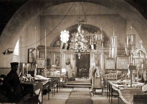 Нямецкі шпіталь у Нароцкай царкве ў час Першай сусветнай вайны.